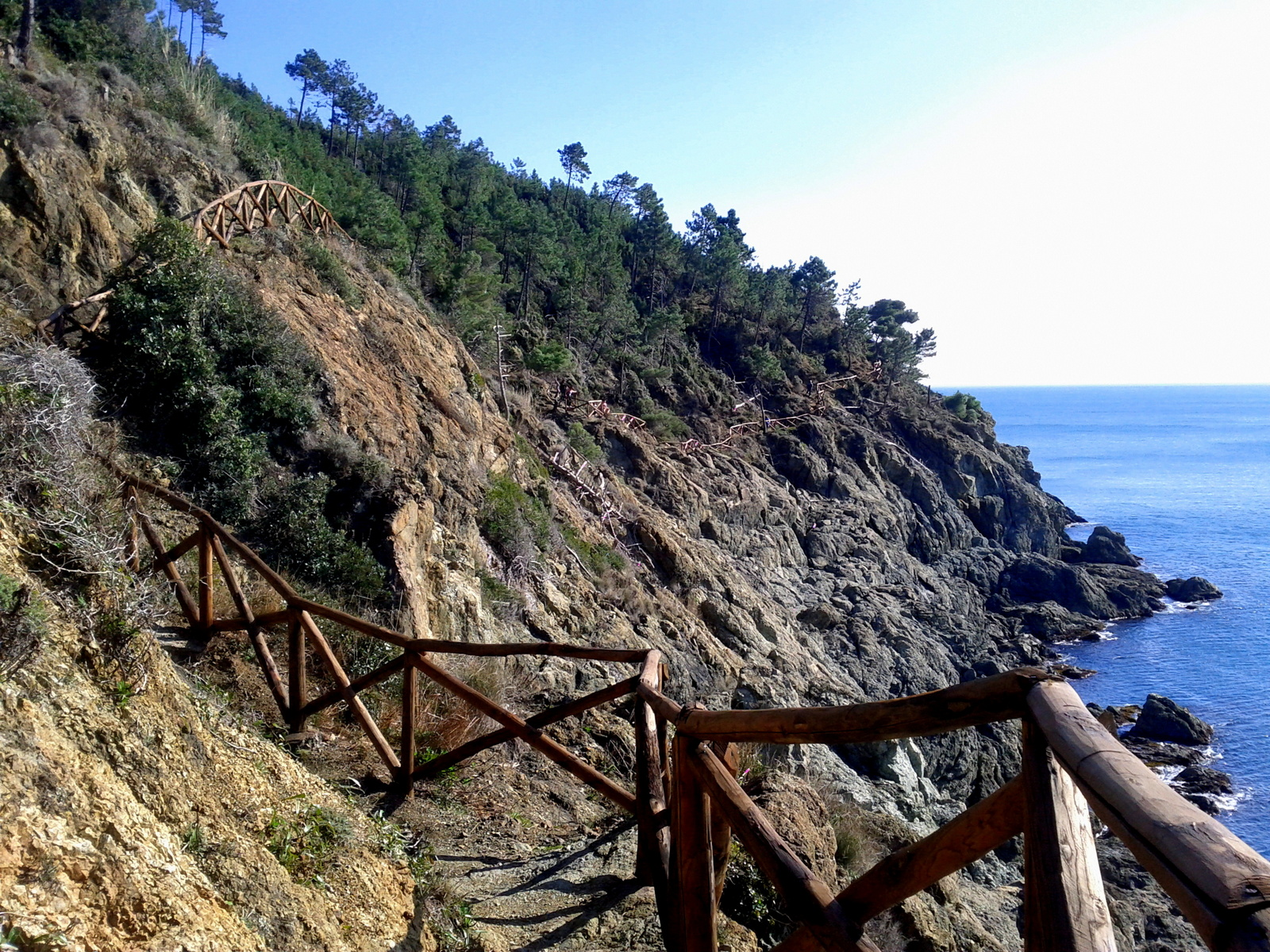 Тропа вдоль мыса Леванто, Бонассола